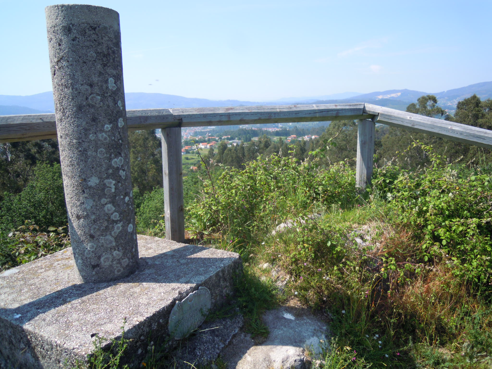 Vértice xeodésico no monte do Castro (Mourente)